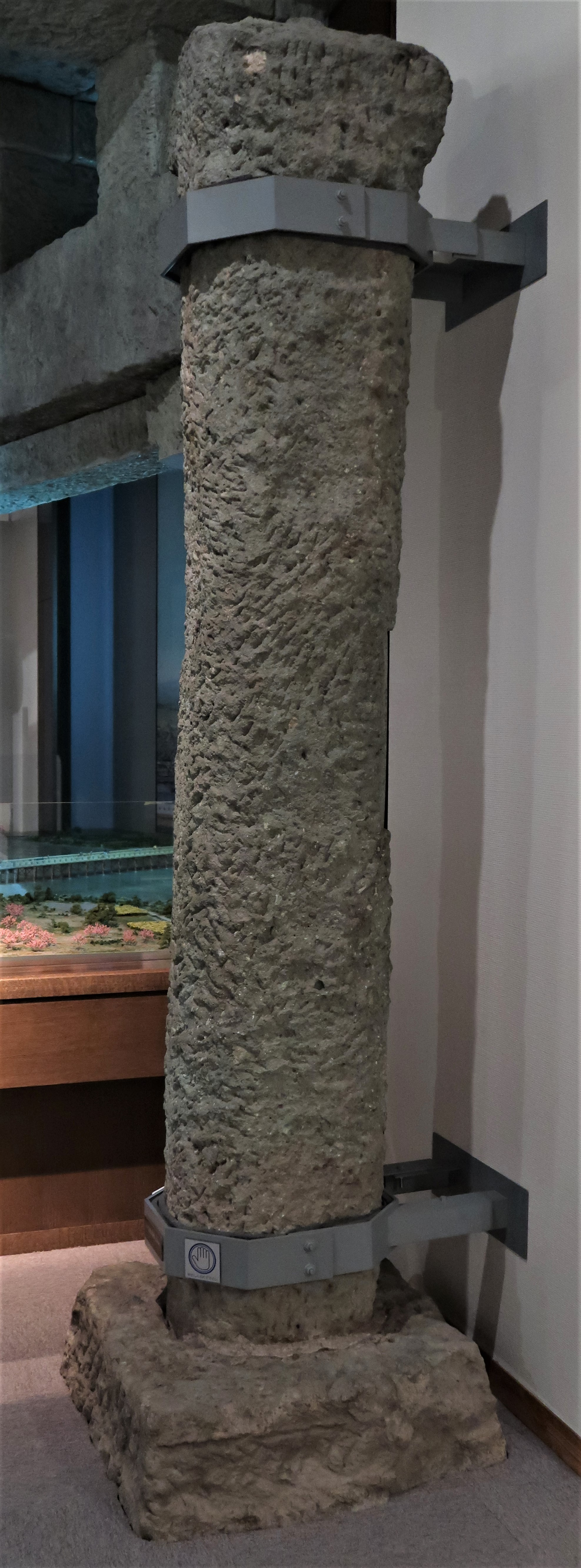 福井市立郷土歴史博物館にある九十九橋の半石半木時代の橋脚